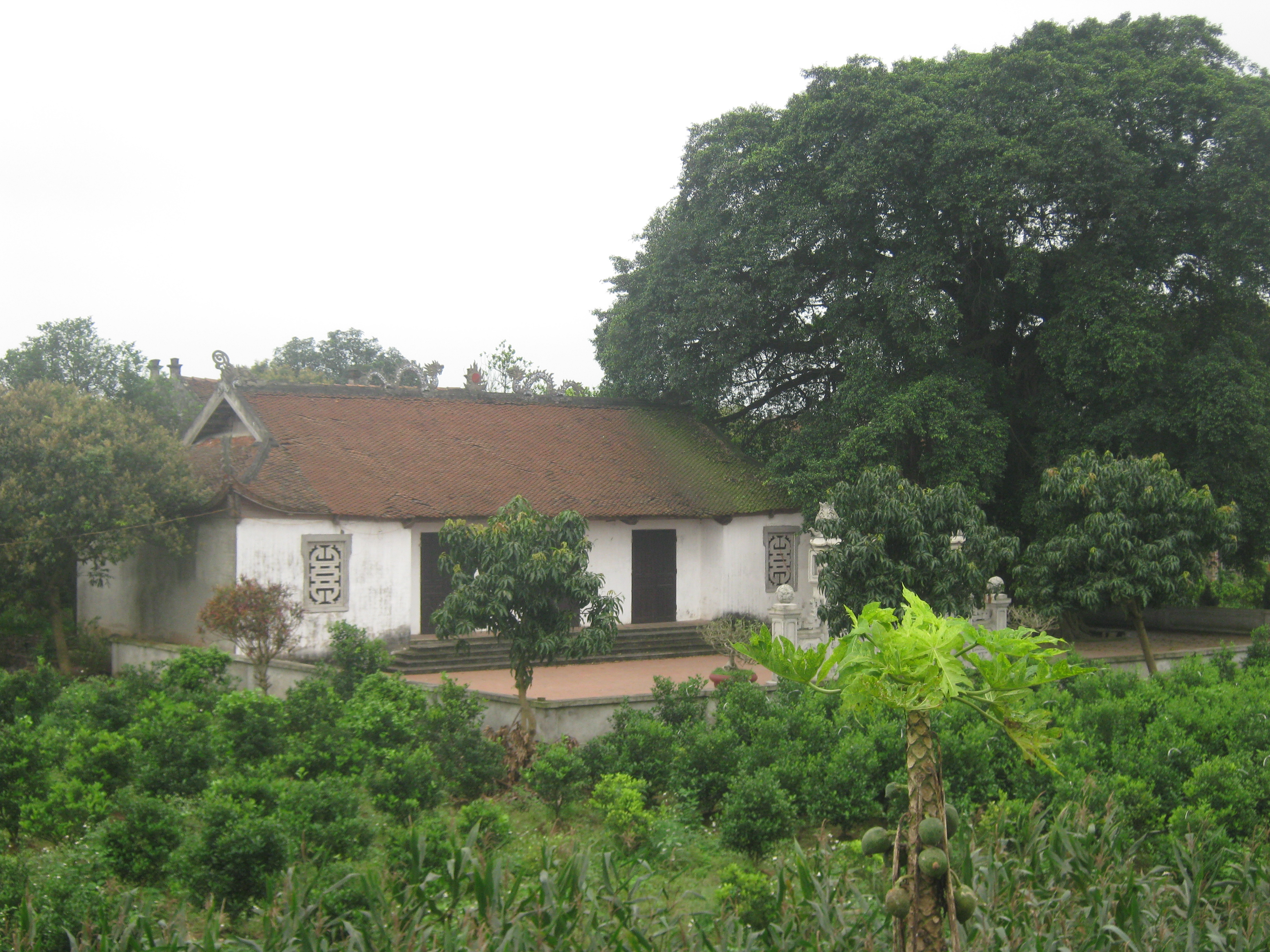 Đình Văn Uyên ở Duyên Hà, Thanh Trì, Hà Nội - Nơi thờ sứ quân Nguyễn Siêu - vị tướng thời vi:12 sứ quân